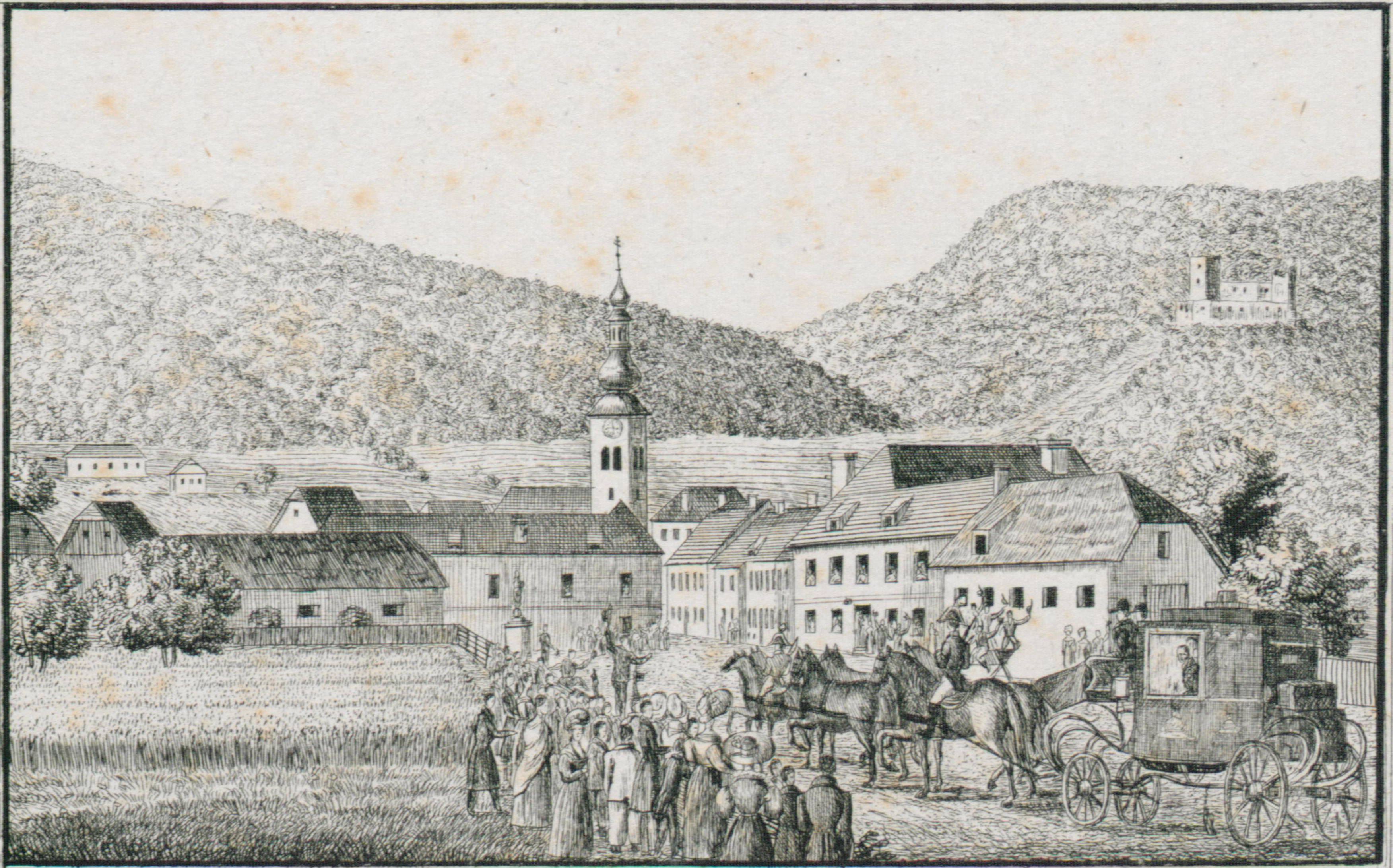 J. F. Kaiser - lithographirte Ansichten der Steyermärkischen Städte, Märkte und Schlösser, Graz 1824-1833